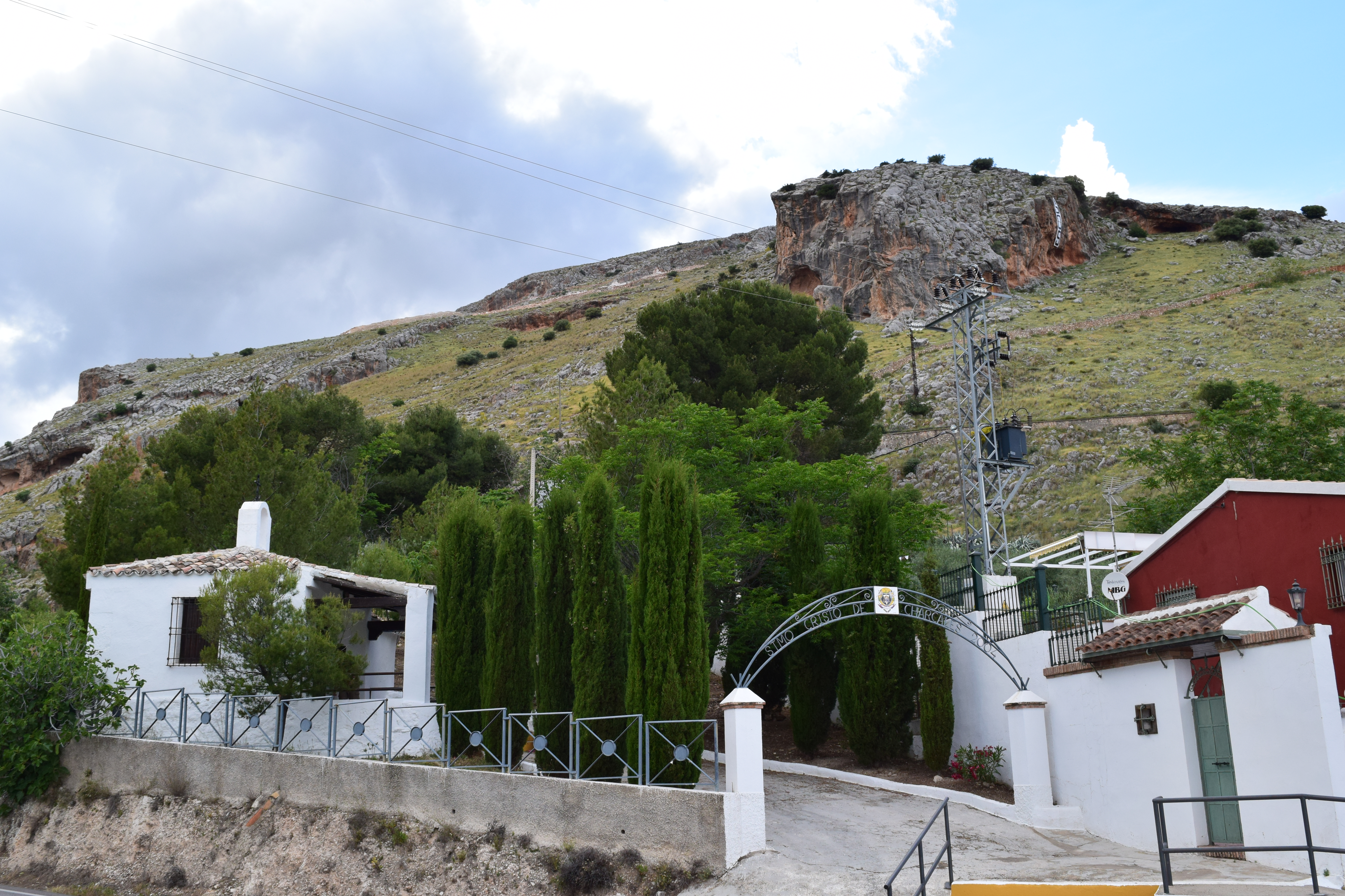 Ermita del Santo Cristo de Charcales (Cristo del Arroz), en Jaén